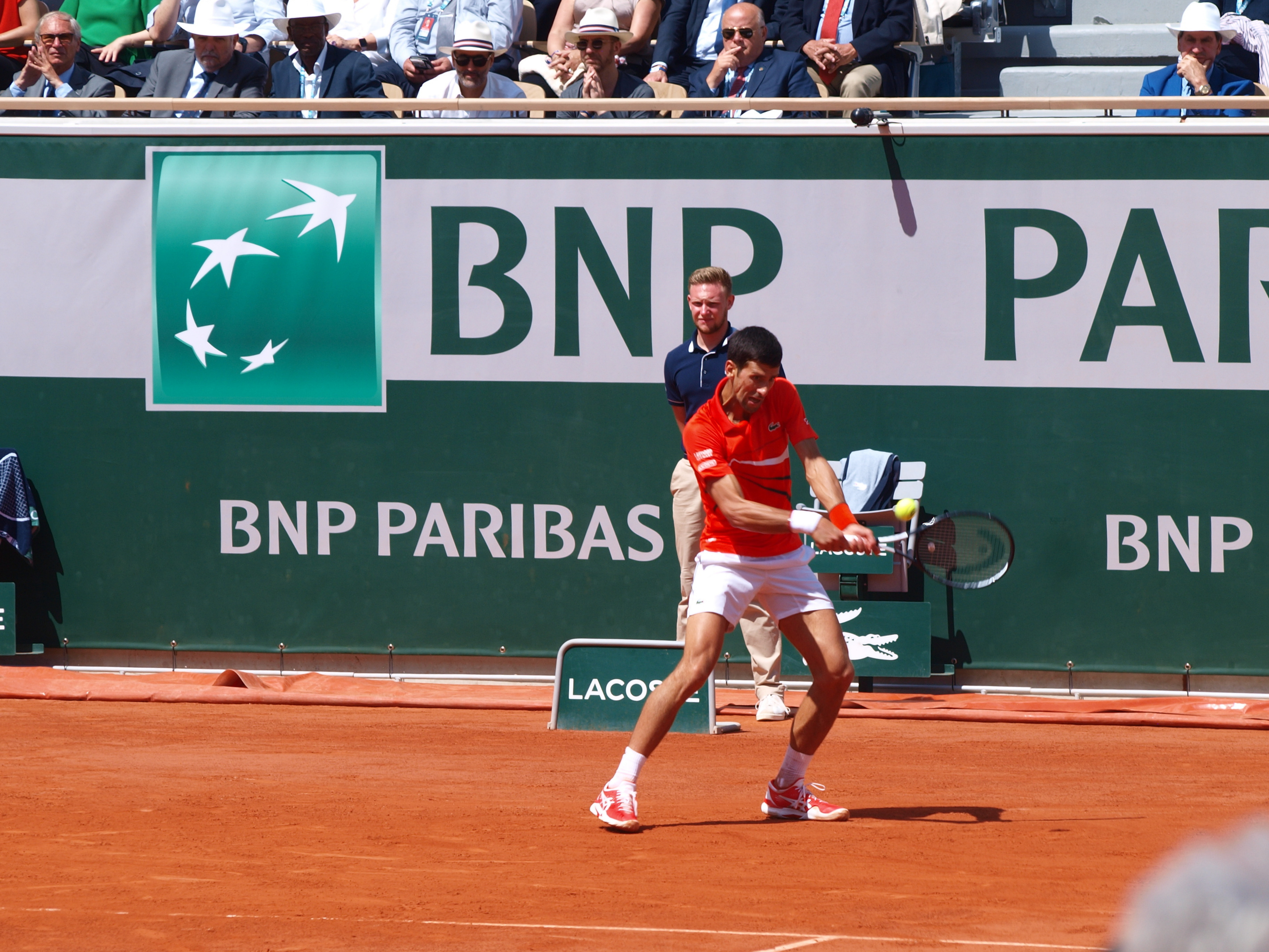 Internationnaux de France de Tennis 2019, au stade Roland Garros de Paris (France), sur le court Philippe-Chatrier rénové; huitième de finale simple-hommes entre N. Djocovic & A. Zverev, le jeudi 6 juin 2019 -- Là, il s'agit du joueur Yougoslave Novak Djokovic (alias Novak Đoković)